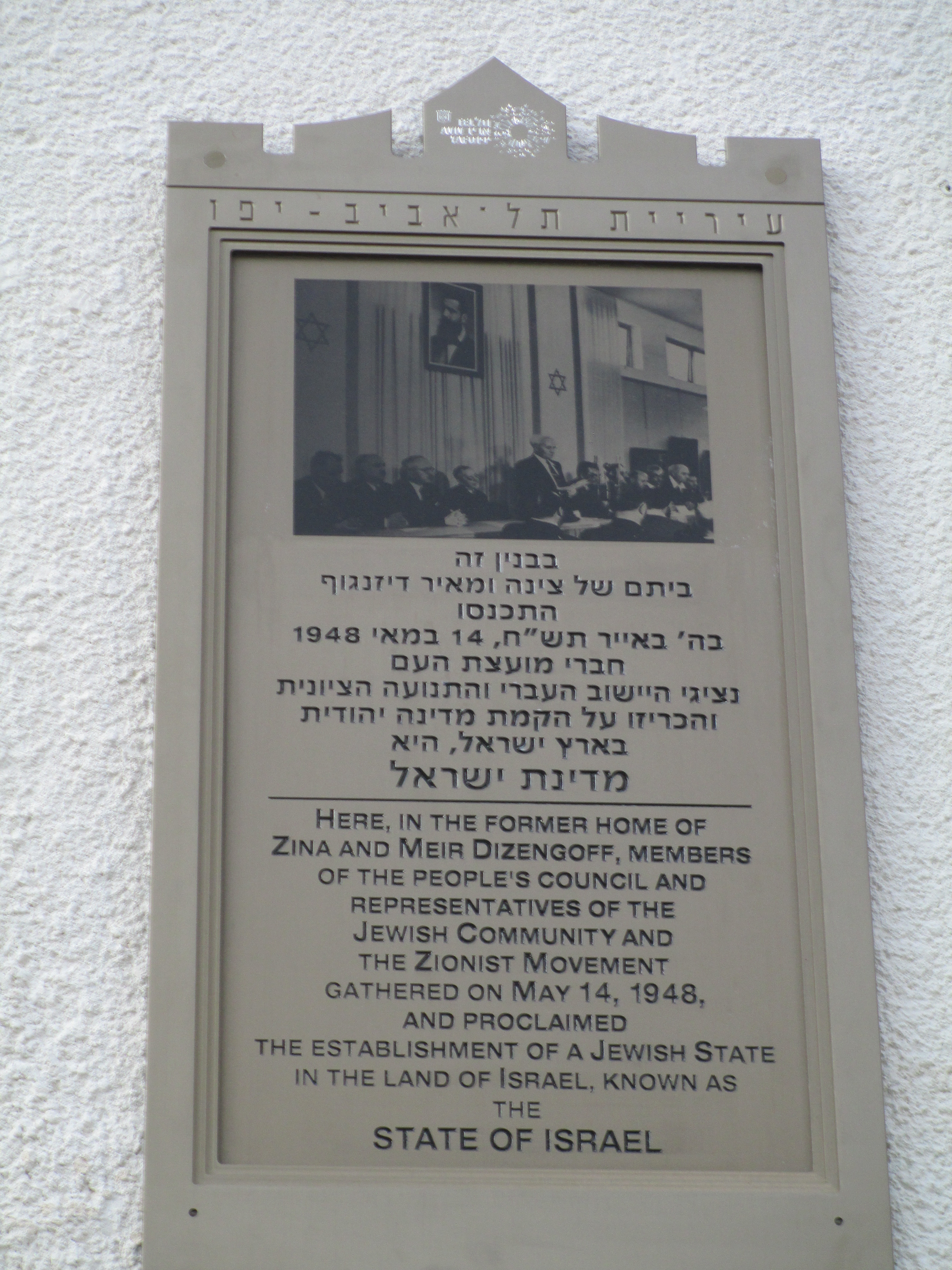 לוחית זיכרון בכניסה למוזיאון העצמאות בשדרות רוטשילד 16 בתל אביב